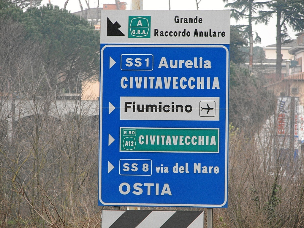 Cartello di immissione sul GRA di Roma